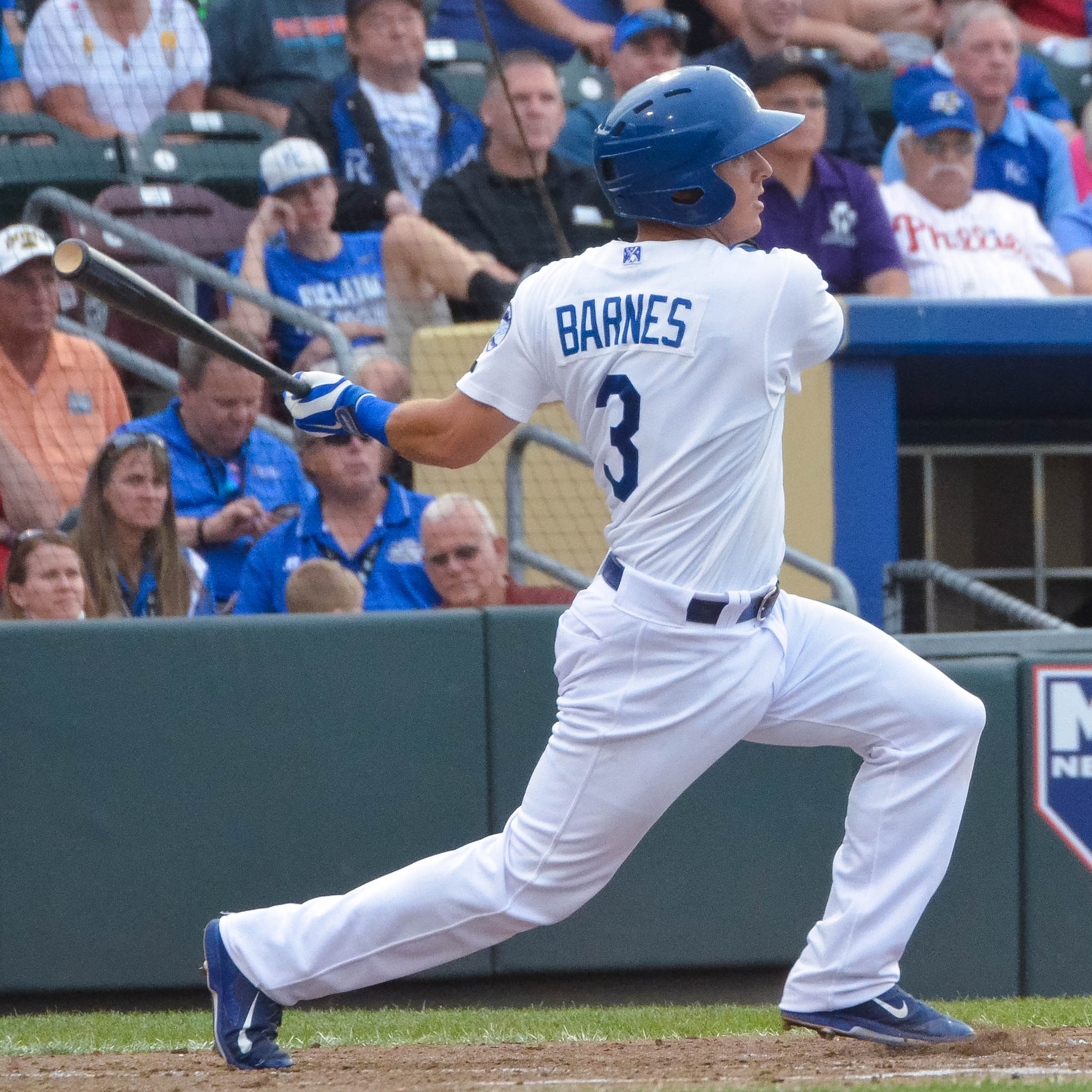 Austin Barnes